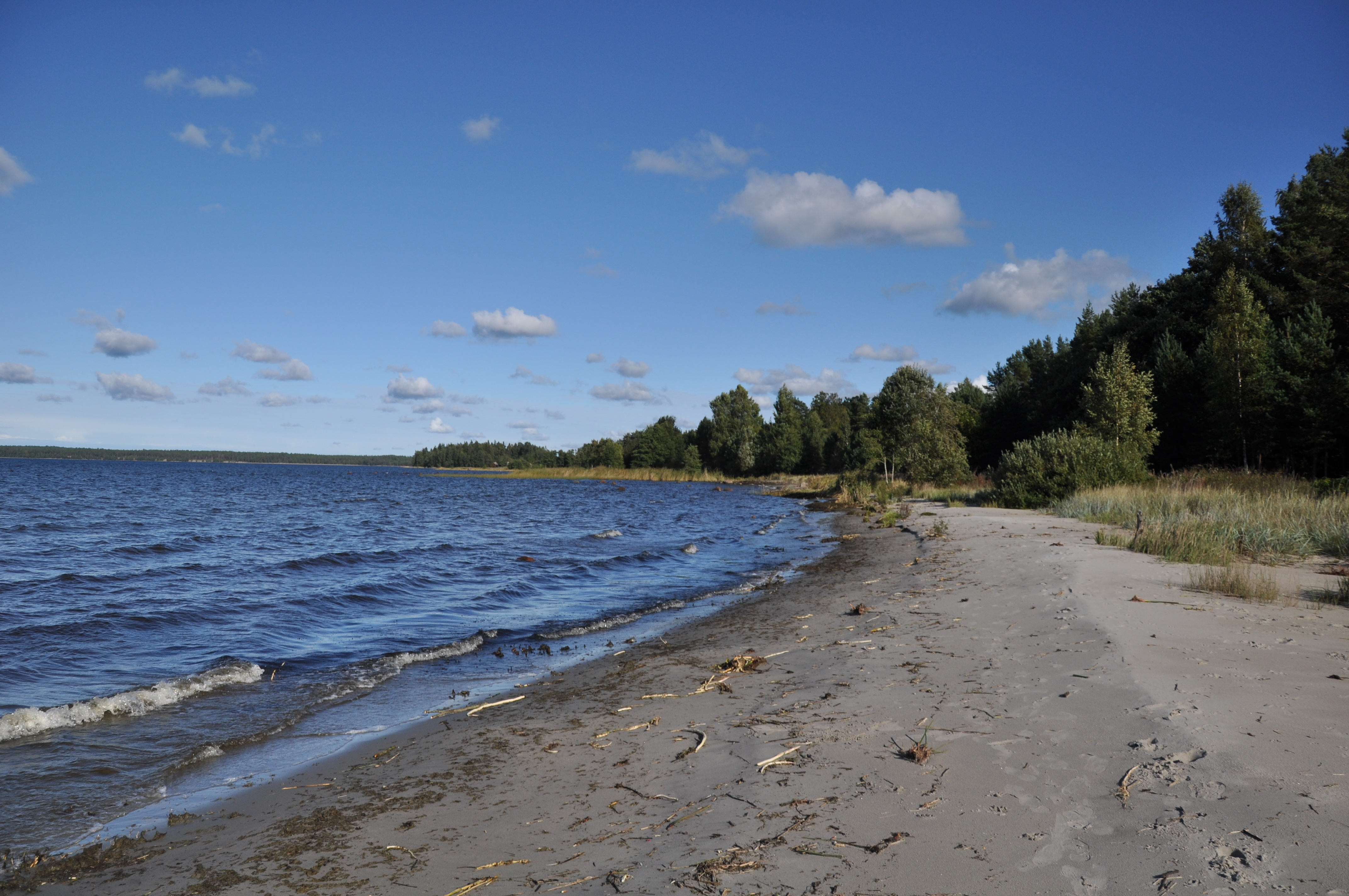 See on ilus Eestimaa rand, mis asub Tammispea külas, Kuusalu vallas :)